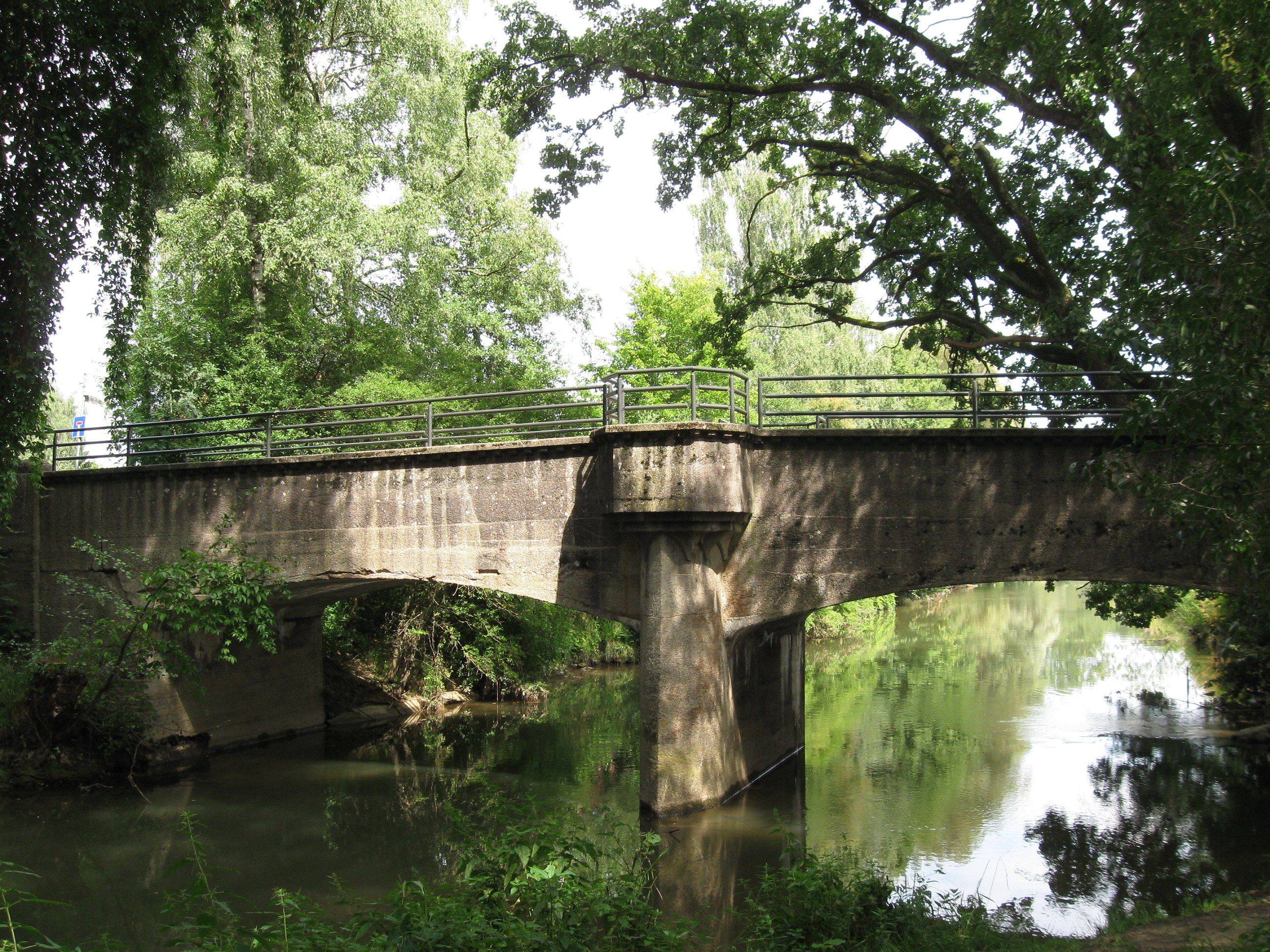 D-1-74-131-68 Zweibogige Brücke über die Glonn, Stampfbeton, 1921